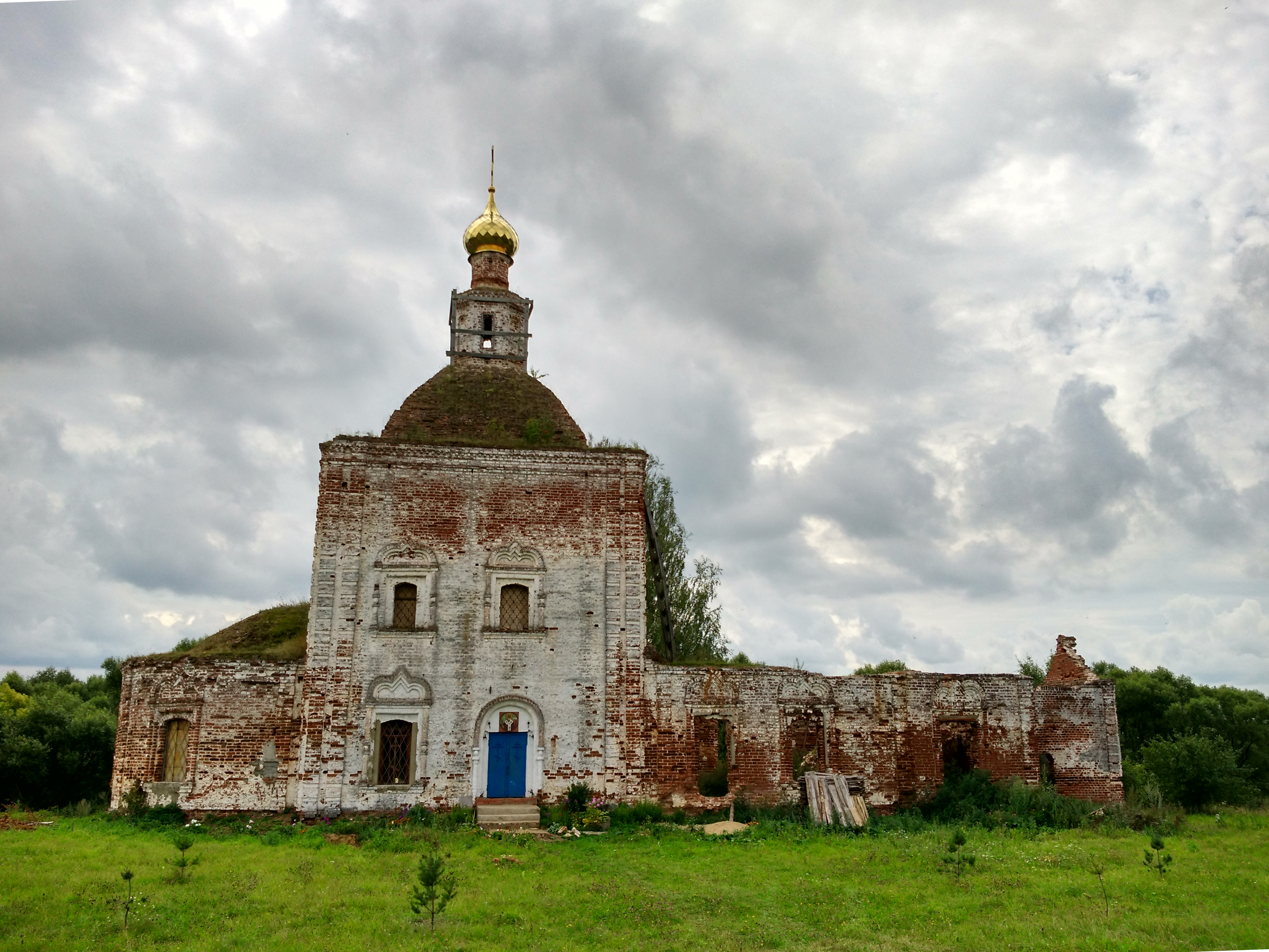 Церковь Николая Чудотворца (Никольская церковь): Лопатницы, Суздальский район, Владимирская область